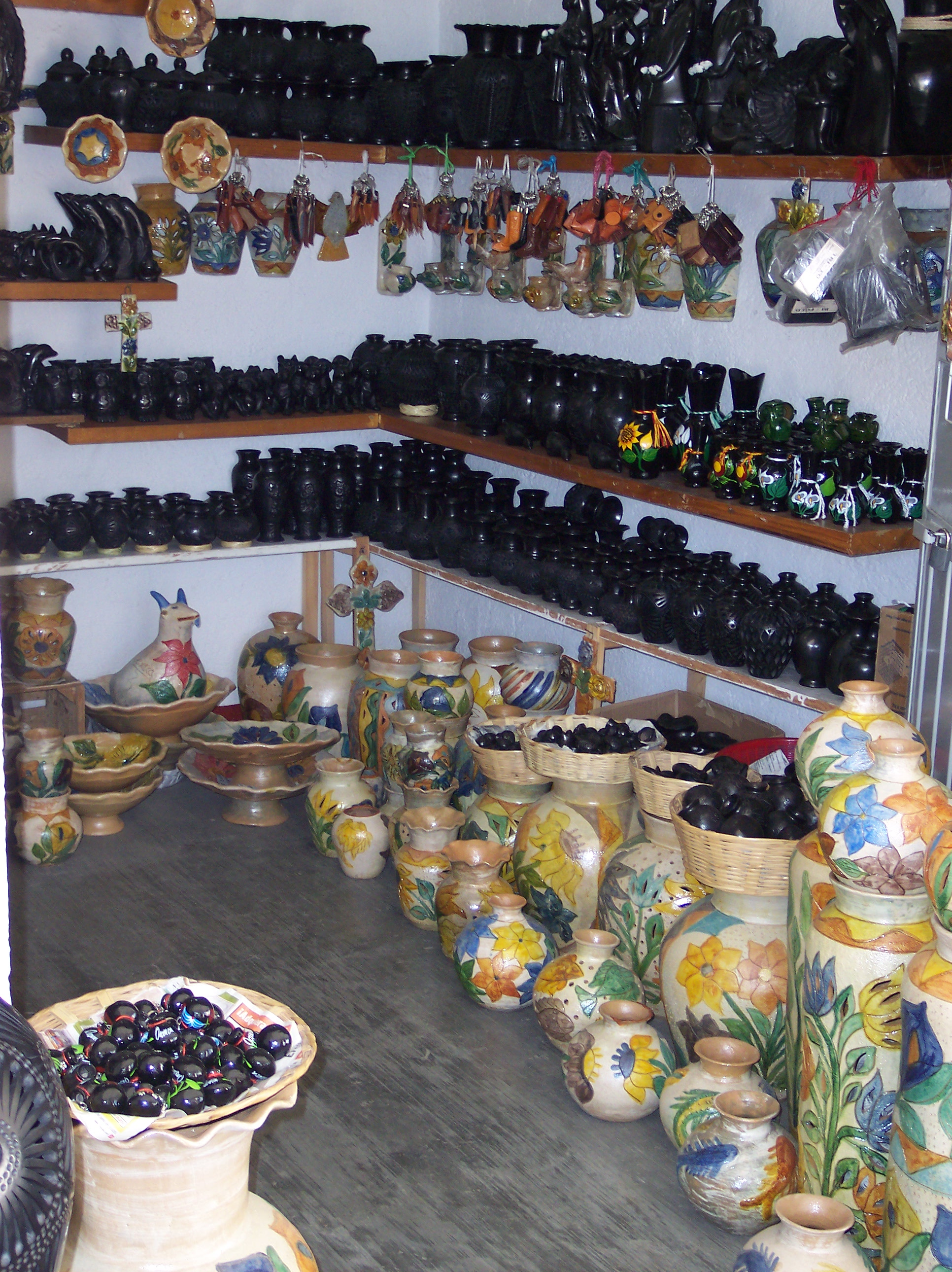 Black mud and conventional mud Handicraft tipical from the San Bartolo Coyotepec Town. SPANISH - Artesanias de barro negro y barro convencional típico del lugar. Located in: San Bartolo Coyotepec. Oaxaca, Mexico.